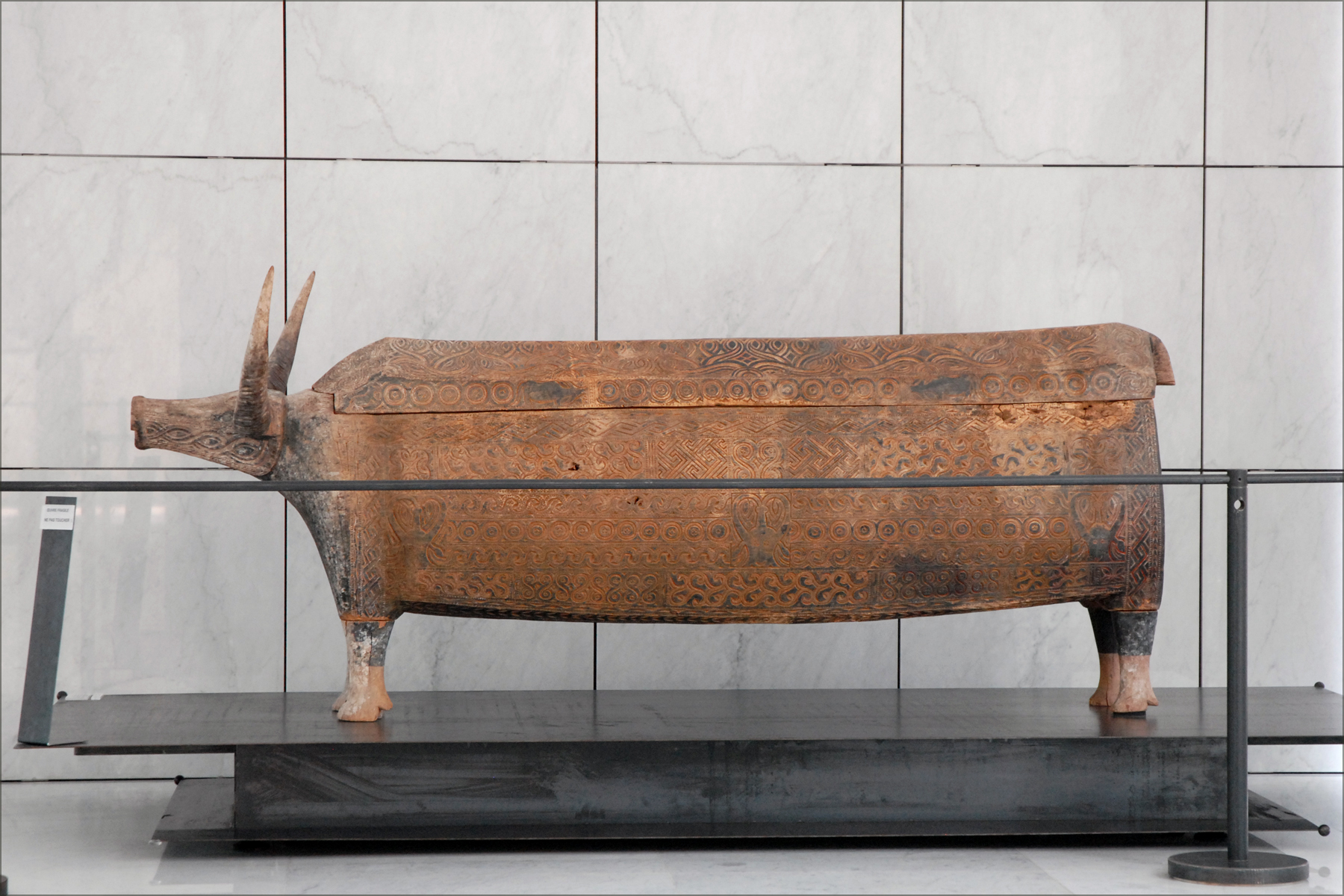 Erong, ossuaire en forme de buffle d'eau Indonésie, bois de teck gravé et polychromé Sulawesi (Célèbes), cornes de buffle ethnie Toraja Sa'dan. XIXe siècle musée des arts asiatiques __________ Le musée, inauguré en 1998, a été conçu par l'architecte japonais Kenzo Tange (1913-2005) au sein du parc Phoenix à Nice (le parc Phoenix est un parc floral situé près de l'aéroport). L'initiative de cette construction remonte à l'époque de Jacques Médecin (1928-1998) , maire de Nice de 1966 à 1990 qui souhaitait y exposer des oeuvres de Pierre-Yves Trémois et des pièces d'art asiatique que l'artiste se proposait de donner à la ville de Nice. C'est P.-Y. Trémois qui aurait incité les responsables politiques à choisir ce célèbre architecte plutôt qu'un architecte local. En raison de la fuite à l'étranger de Jacques Médecin et de sa condamnation pour corruption, le projet initial a été abandonné et l'édifice est resté inoccupé durant plusieurs années. Le projet a été par la suite transformé par le conseil général des Alpes maritimes en musée des arts asiatiques, avec le soutien de la direction des musées de France et le concours du musée Guimet. Le premier conservateur du musée Marie-Pierre Foissy-Aufrère a brillamment relevé le défi de faire un musée évoquant les grandes civilisations asiatiques, de l'antiquité à aujourd'hui, dans un espace certes exceptionnel mais extrêmement exiguë. ___________________ "Le plan du musée repose sur deux formes géométriques fondamentales de la tradition japonaise; le carré, symbole de la terre,et le cercle, symbole du ciel....." Kenzô Tange site officiel article de Wikiipedia sur l'architecte